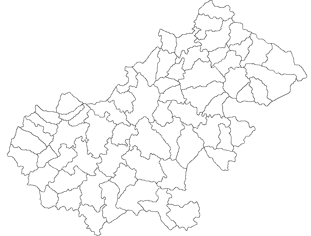 Categorie:Hărţi ale judeţului Satu Mare